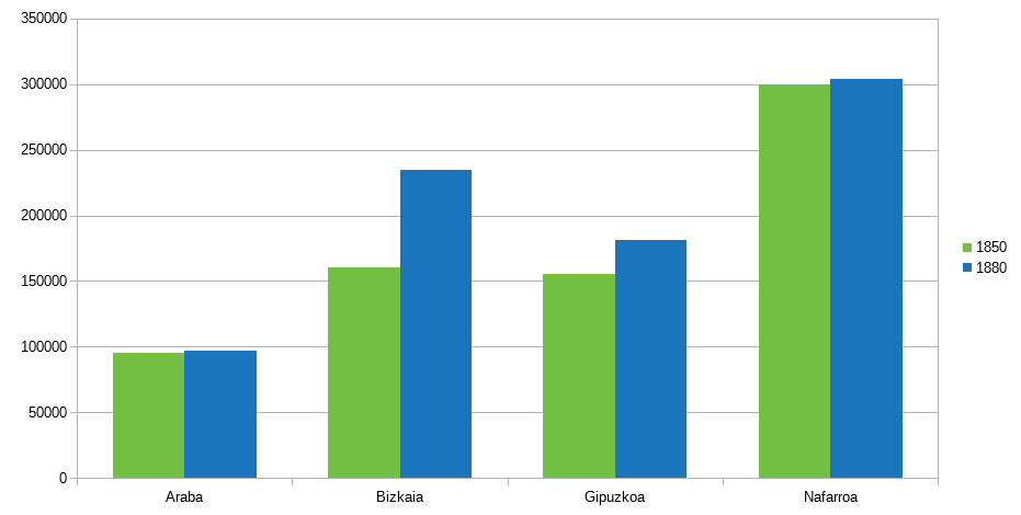 Hego Euskal Herriko biztanleriaren aldaketa 1850 eta 1850 artean, herrialdeka